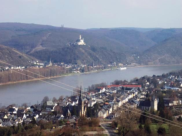 Ein Blick auf die beiden Kirchen und den Rhein.